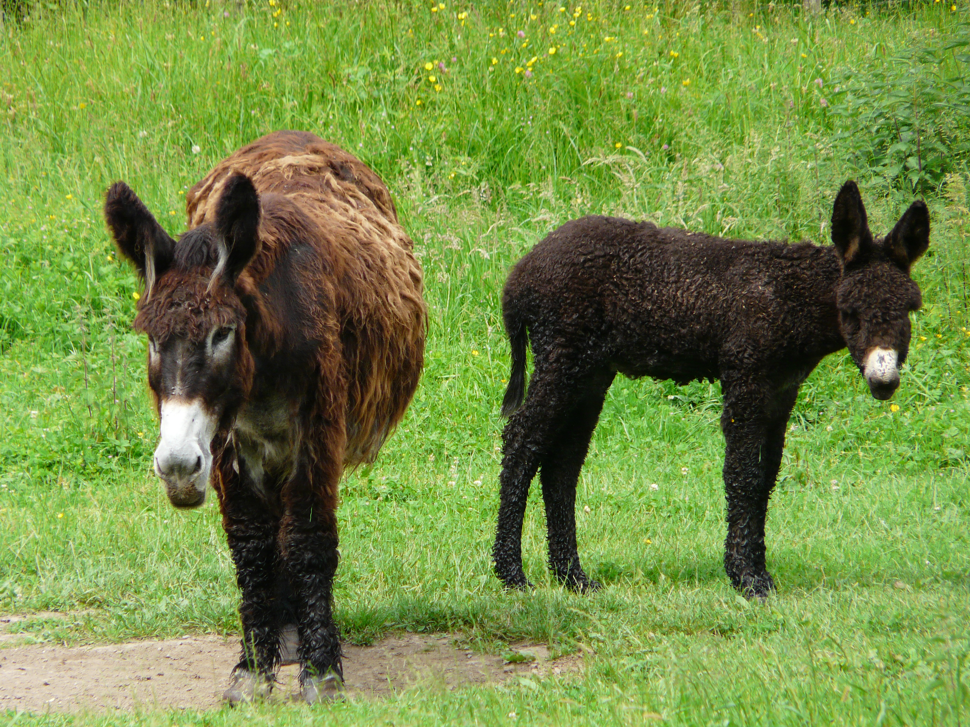 Femelle de baudet du Poitou et son jeune, Haute-Garonne, France.